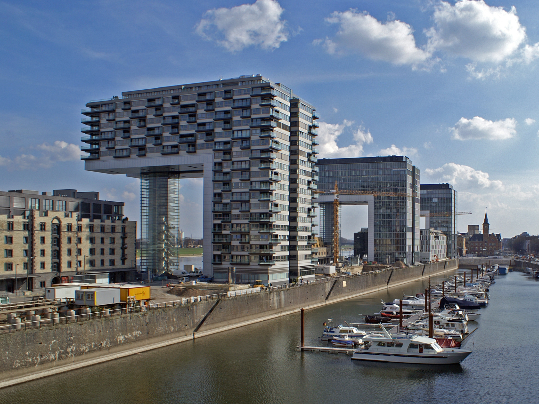 Rückansicht der Kranhäuser im Rheinauhafen Köln im März 2011.